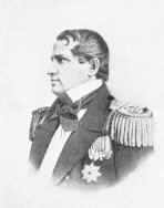 Prins Adalbert av Preussen (1811–1873) ivret for etableringen av en prøyssisk marine